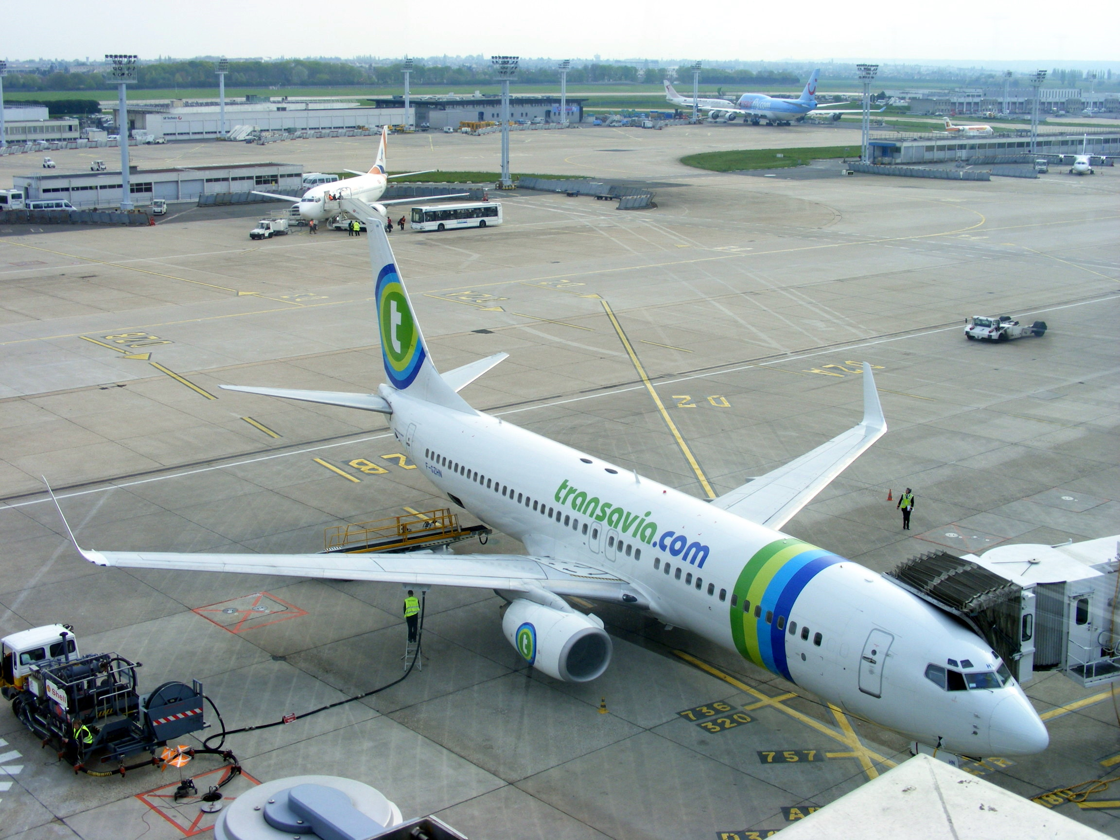 France Boeing 737 in Paris